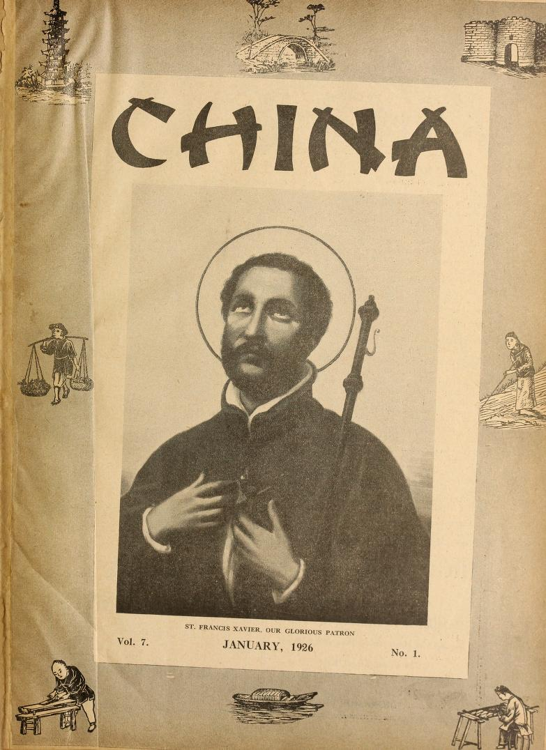 Couverture de la revue China éditée par la Société des Missions étrangères de Scarboro (Canada), n° janvier 1926. Couverture représentant saint François Xavier.